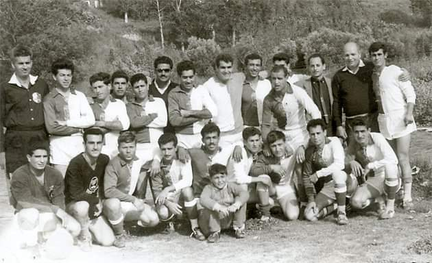 הפועל קריית שמונה בשנת 1963 והילד סמי מלול כקמע הקבוצה